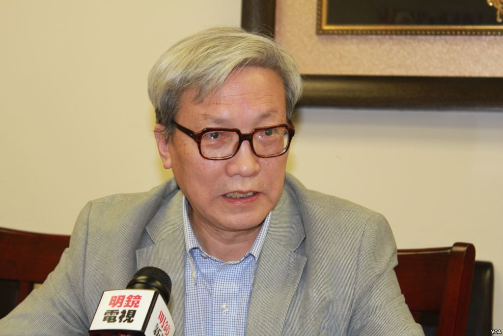 中華人民共和國憲政學者張博樹出席紀念胡耀邦誕辰100周年討論會。